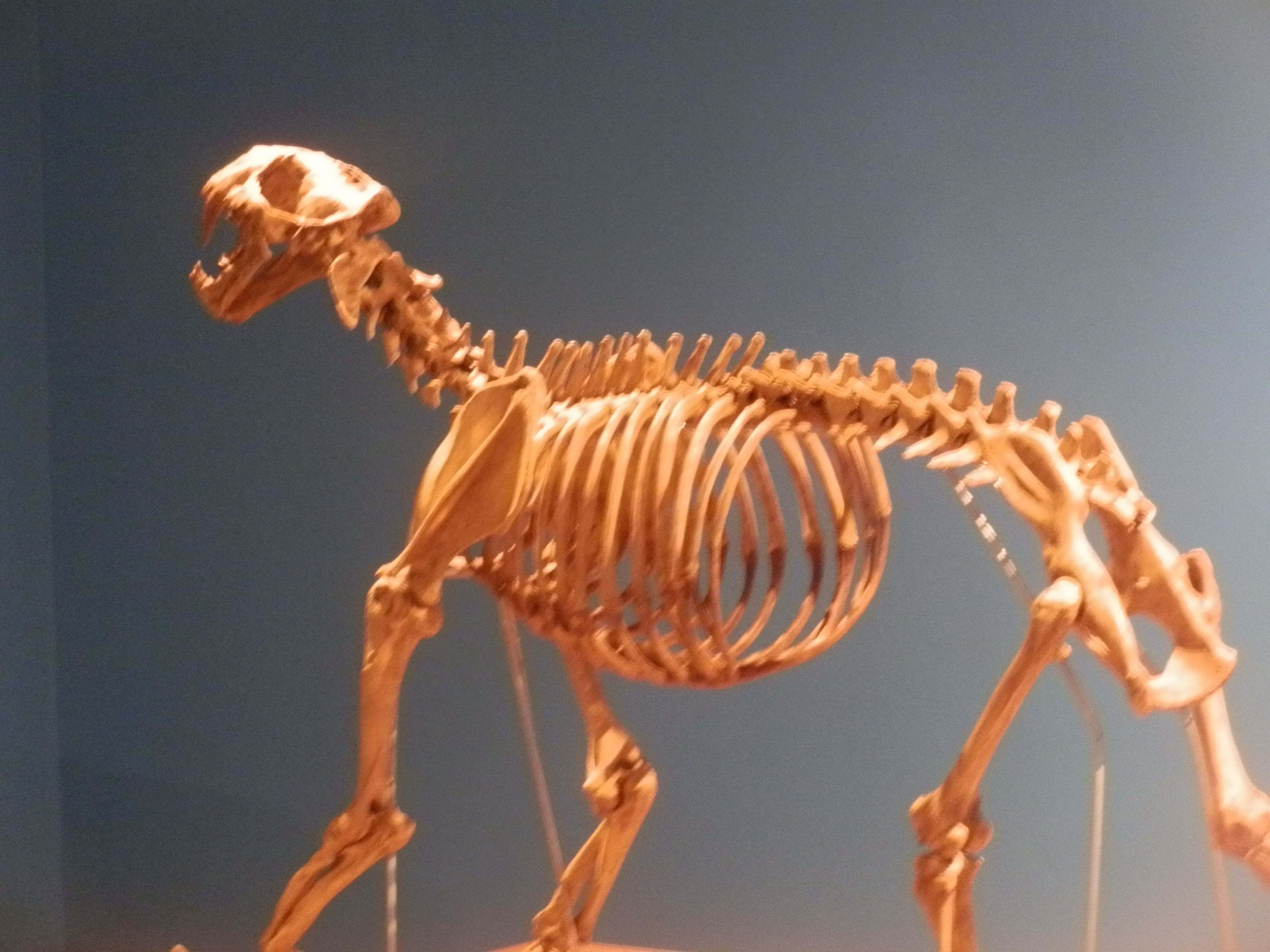 Réplica de esqueleto de Homotherium venezuelensis en PDVSA La Estancia, Maracaibo.